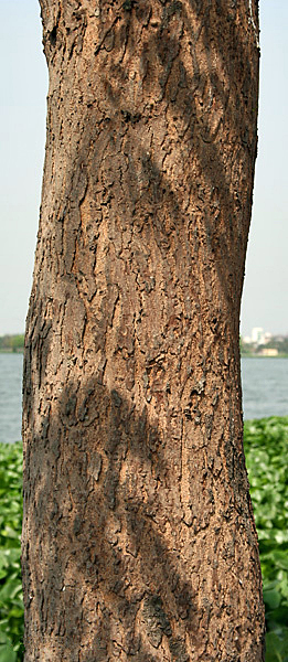 Spanish Mahogany Swietenia mahagoni in Kolkata, West Bengal, India.